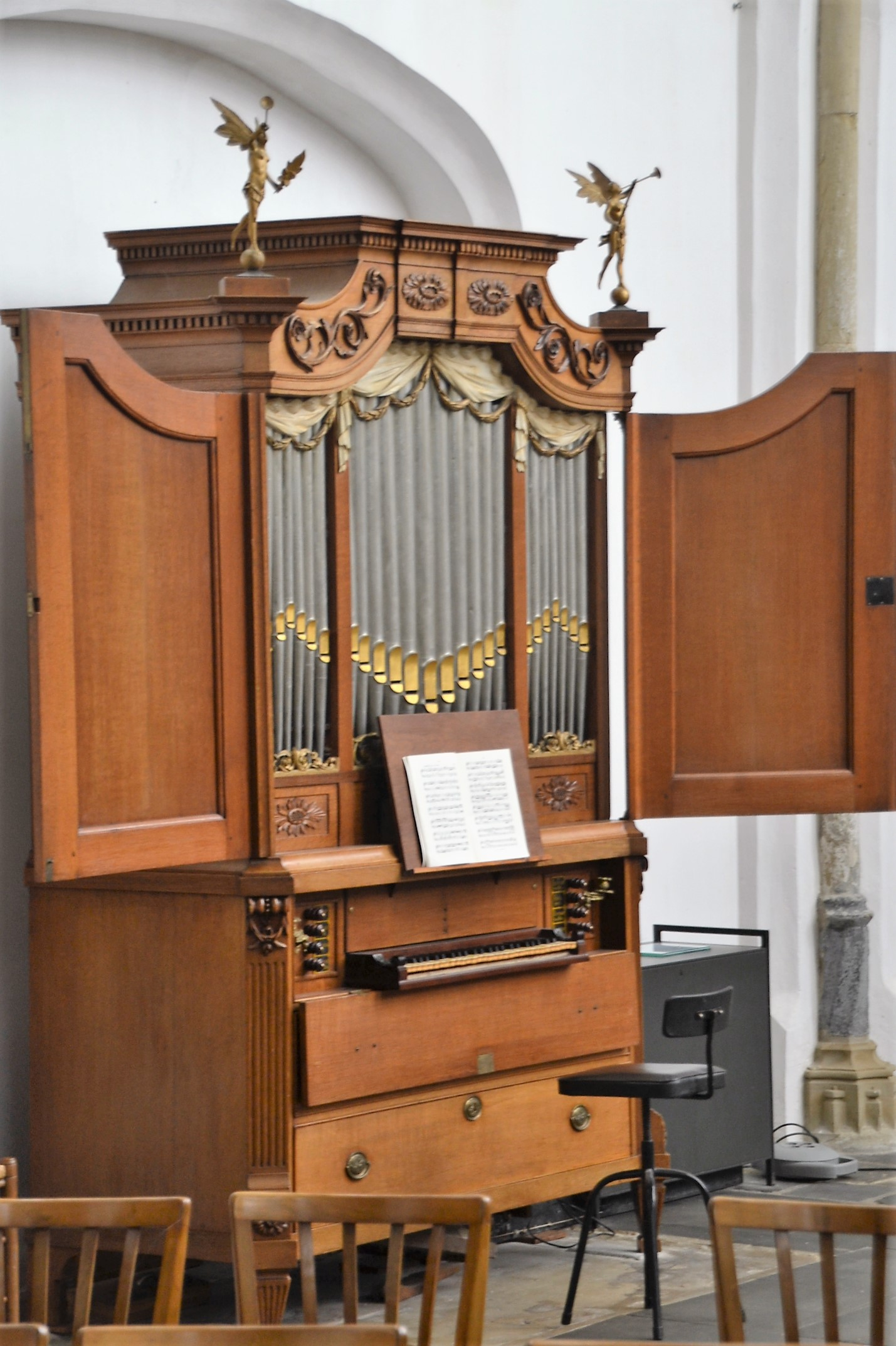 Martinikerk Doesburg, Freytag-orgel 070816